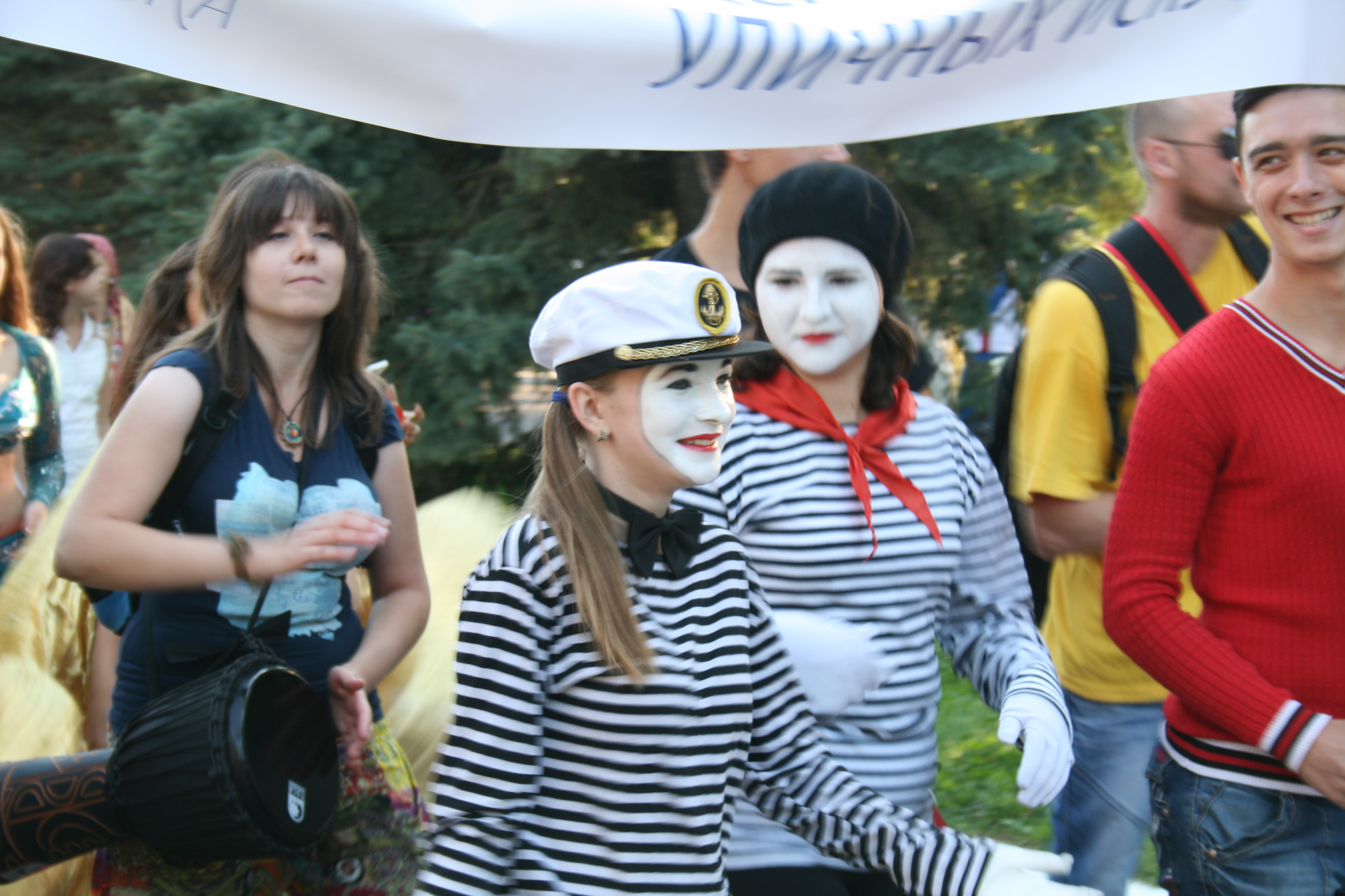 Первый день фестиваля уличных искусств «Белая маска». Белгород, 5 сентября 2014.